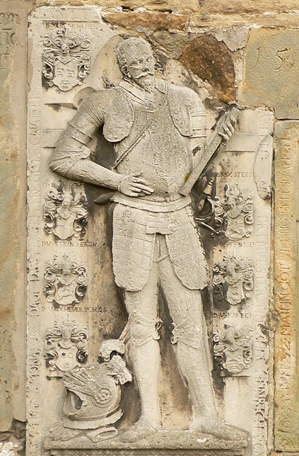 Grabplatte von Heinrich von Cramm an der Fassade der Kapelle in Oelber am weißen Wege